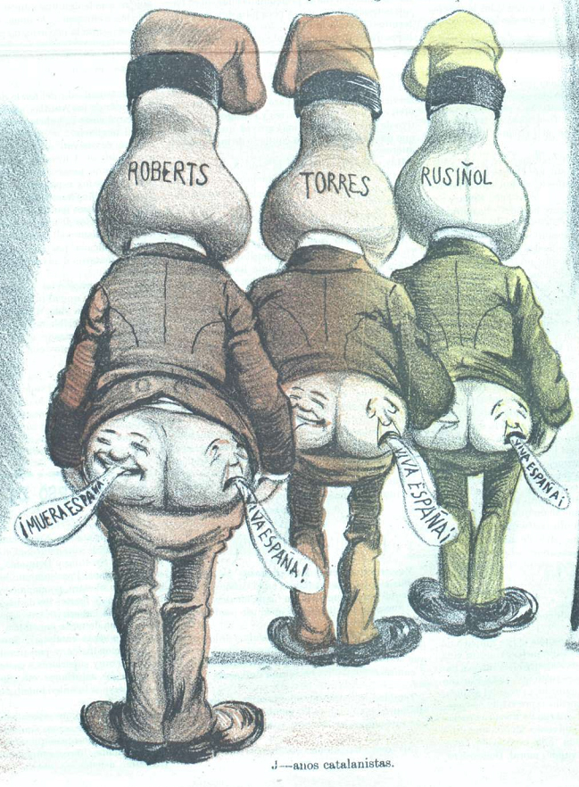 Caricatura.